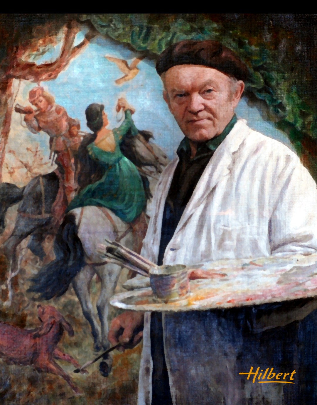 Fritz Hilbert bei seiner Arbeit